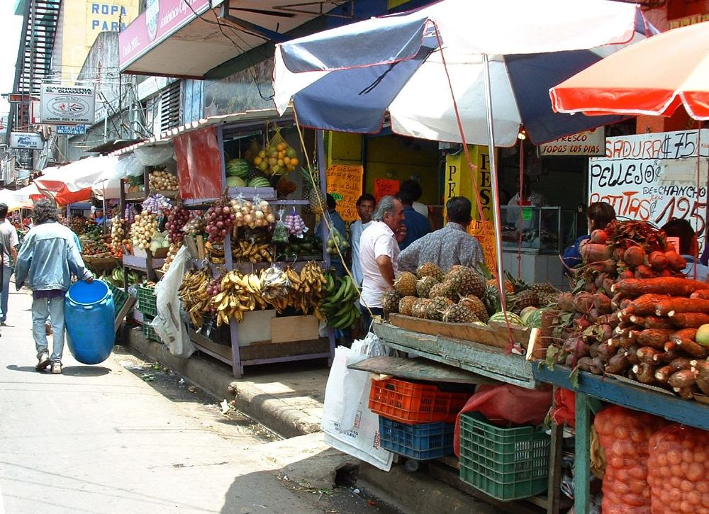 Roadside produce vendors in San José, Costa Rica